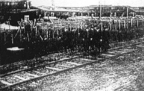 Grupa internowanych żołnierzy armii URL przed Obozem Internowania nr 6 w Aleksandrowie Kujawskim, 1921